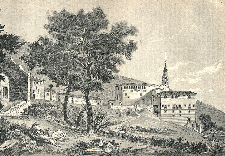 Monasterio de San Jerónimo del Valle de Hebrón, grabado de Pau Rigalt i Fargas (siglo XIX).